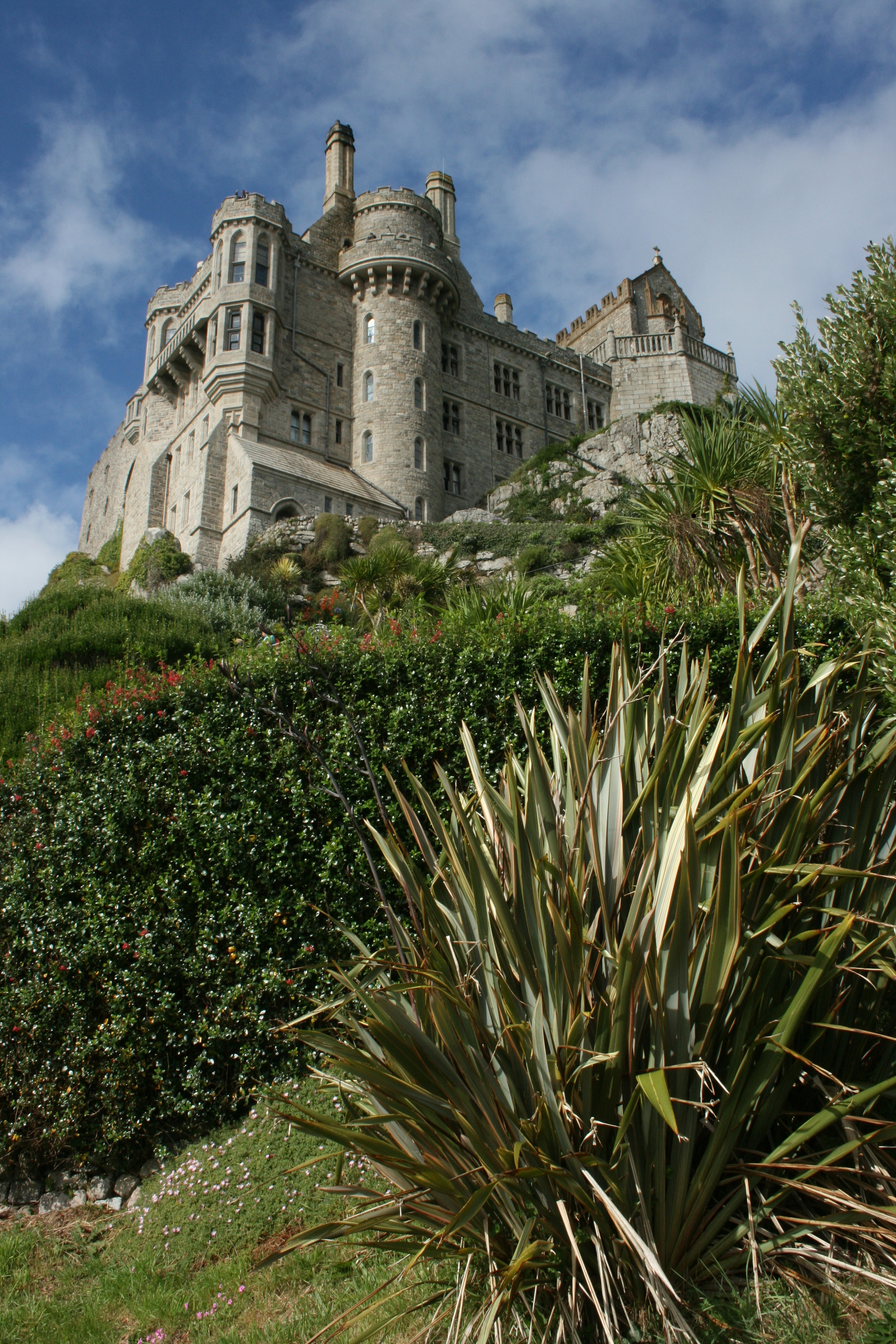 Blick auf St. Michael's Mount aus dem subtropischen Garten